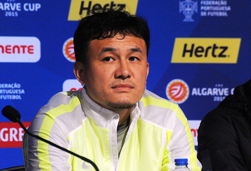 a_89_4808